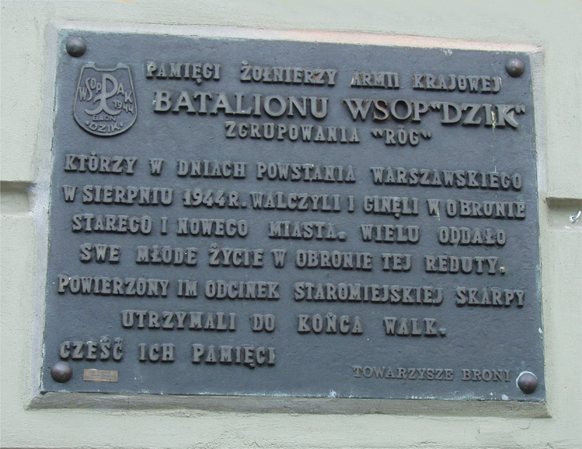 Przy ul Mostowej w Warszawie (fot Zu)